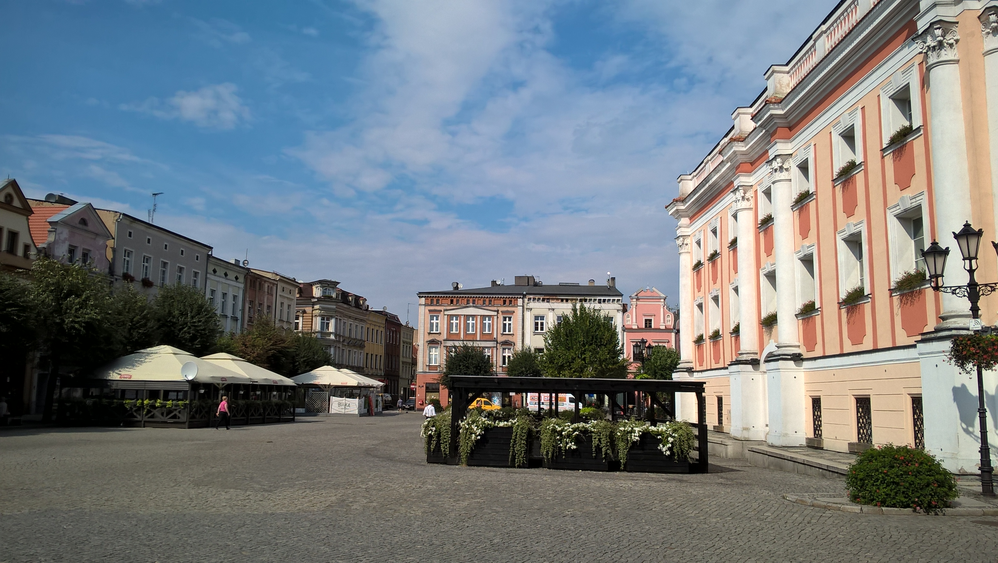 Leszno,Stary Rynek-pierzeja zachodnia i północna